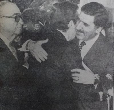 Julio Rajneri asume como Ministro de Educación y Justicia en el gobierno de Raúl Alfonsín, julio de 1986.